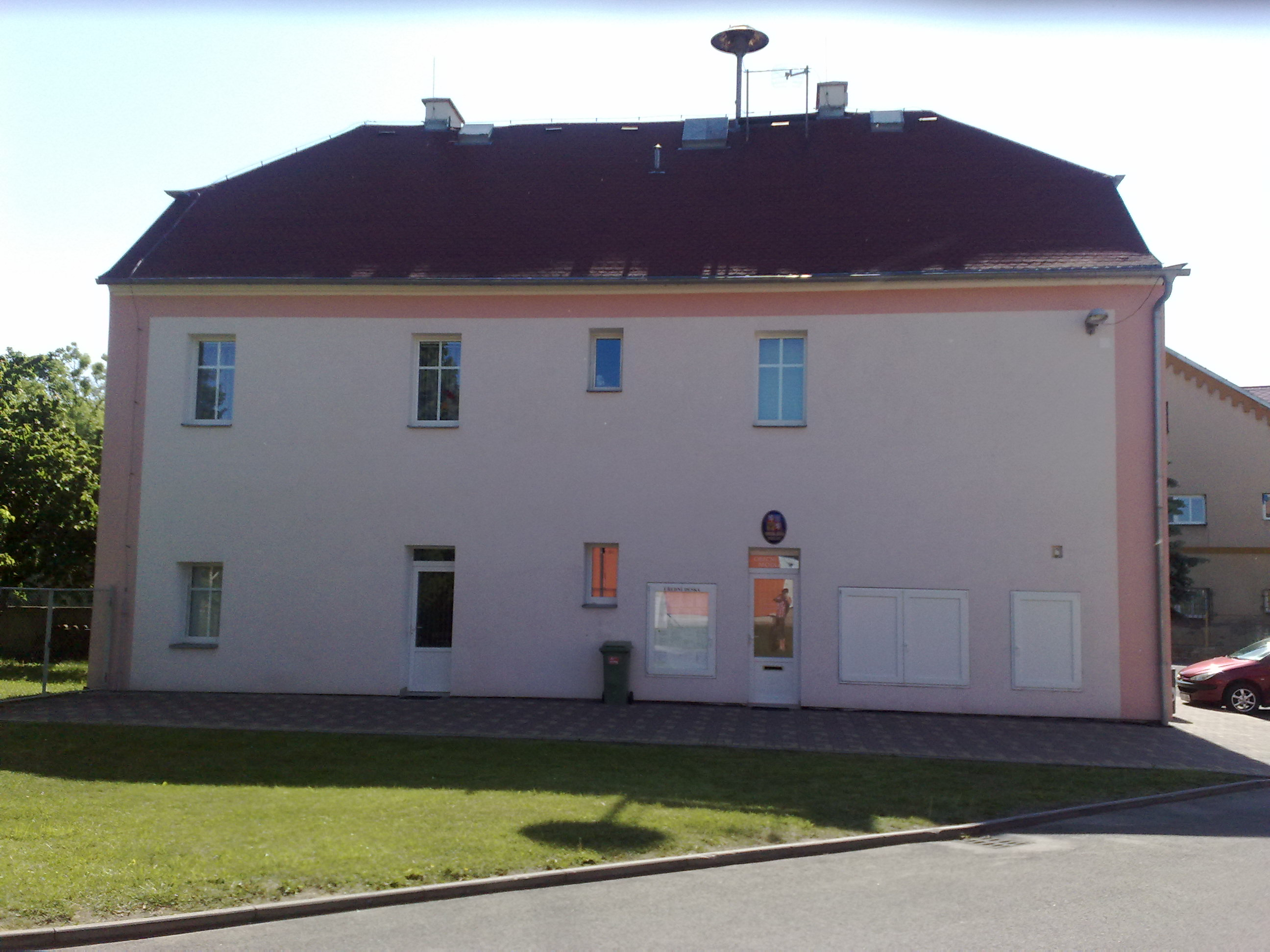 Fotografie pořízená v obci Modlany na Teplicku.